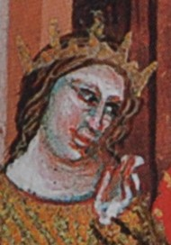 Jitka